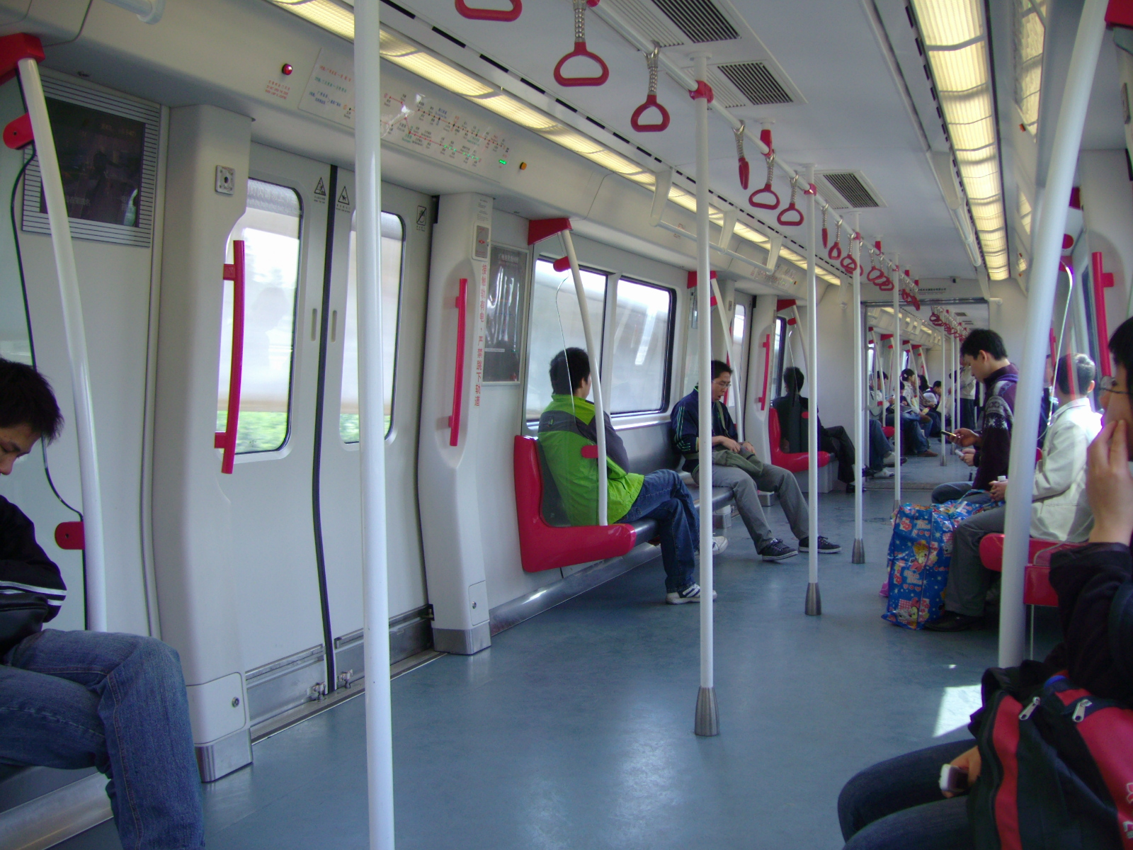 中文（中国大陆）: 广州地铁四号线车厢